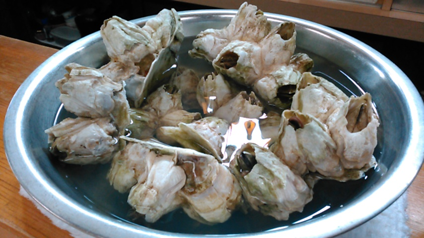 ミネフジツボ。青森市新町 御食事処 大もり屋にて提供しているもの。青森県東津軽郡平内町産。これは水煮してあり食べられる状態。